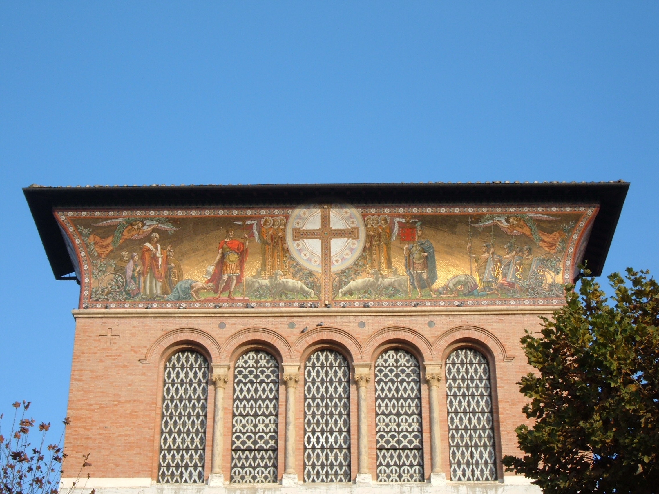 Basilica di Santa Croce a Via FLaminia, a Roma, nel quartiere Flaminio. Particolare della facciata con al centro il Trionfo della croce, ai lati l’Editto di Milano e la Vittoria di Costantino a Ponte Milvio. I cartoni realizzativi dei mosaici furono relaizzati da Biagio Biaggetti.